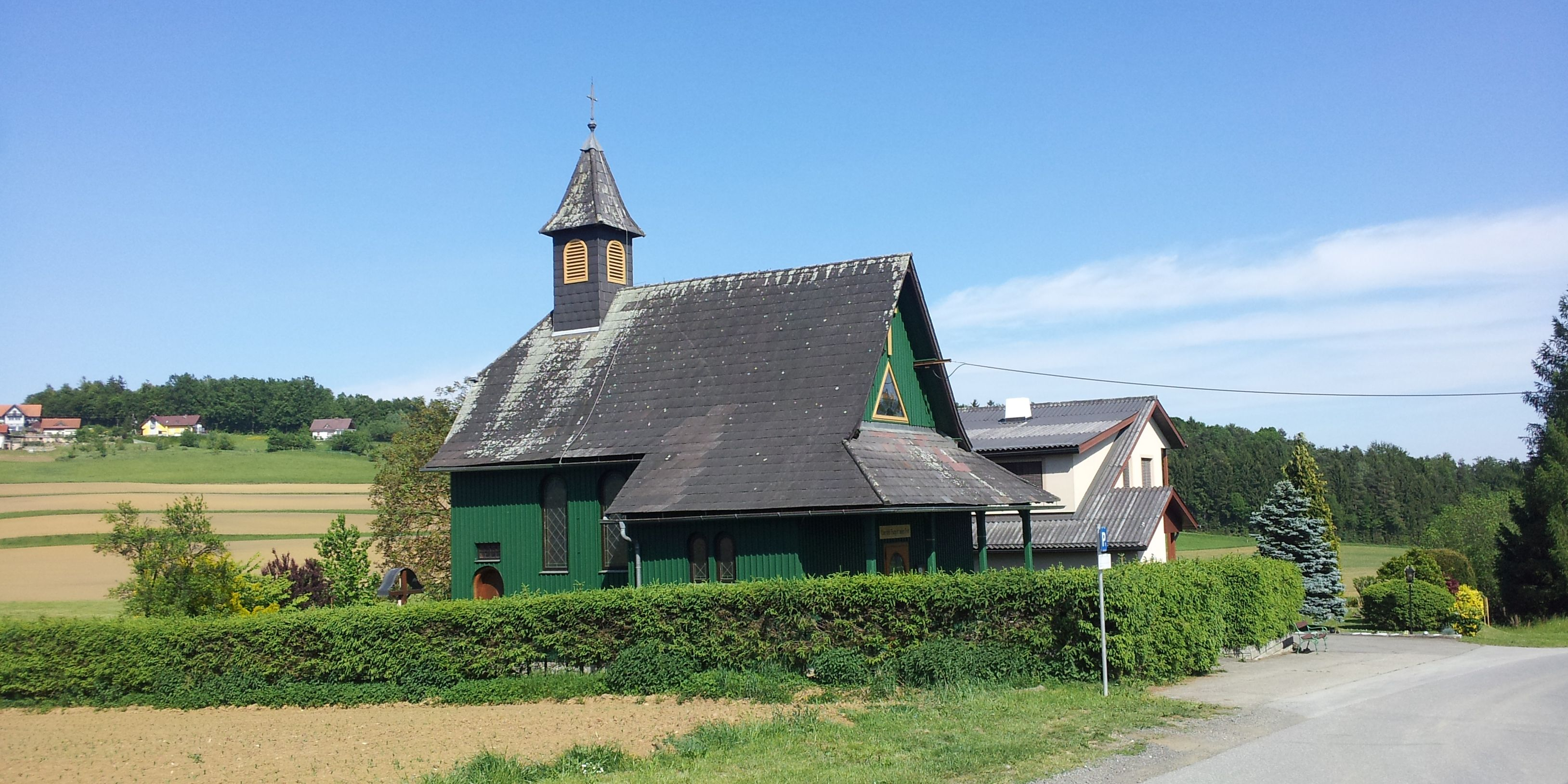 Evang. Filialkirche Hengsberg